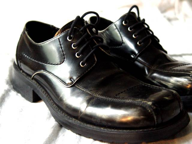 کفش مردانه.